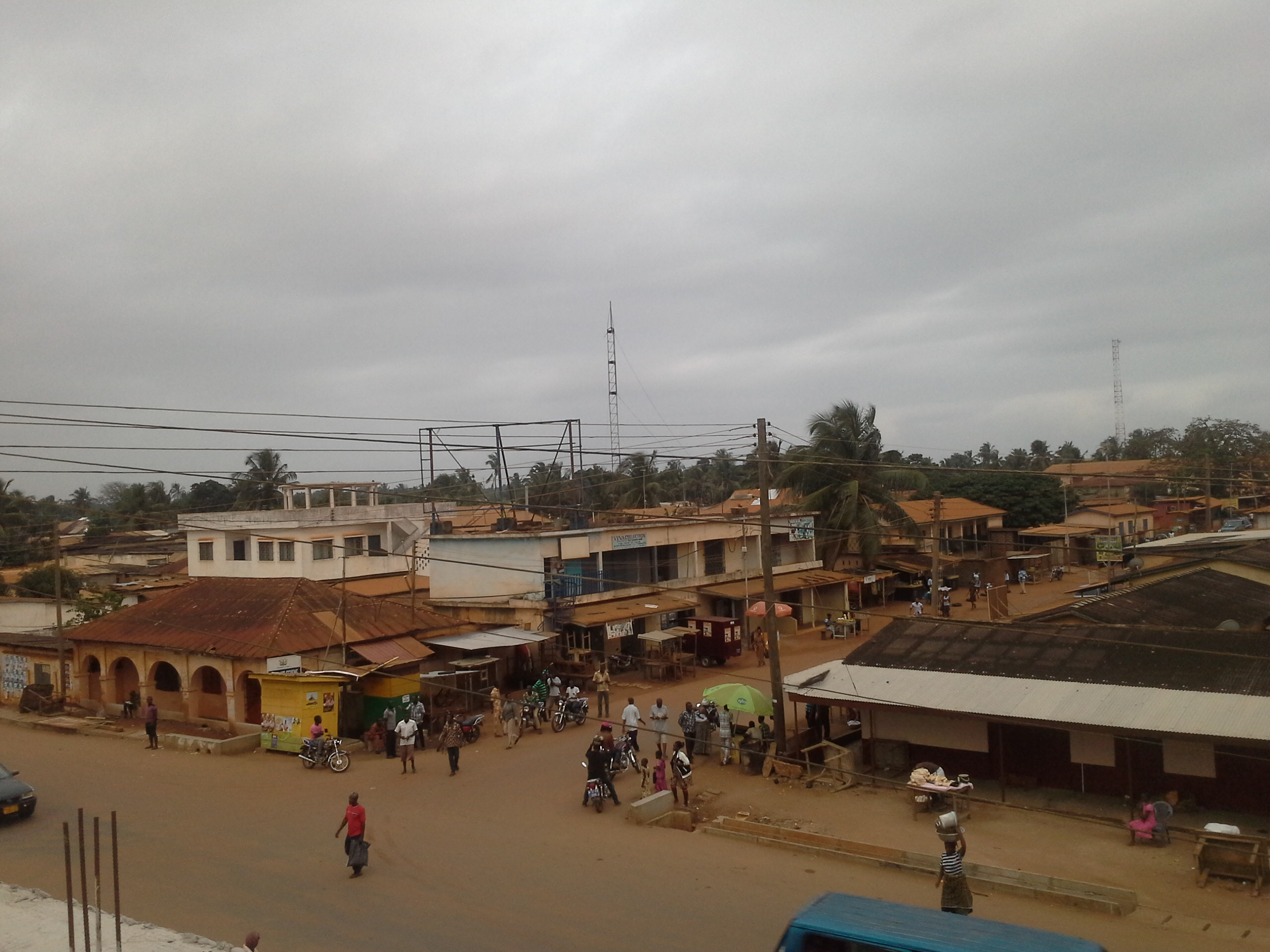 Denu junction aerial view